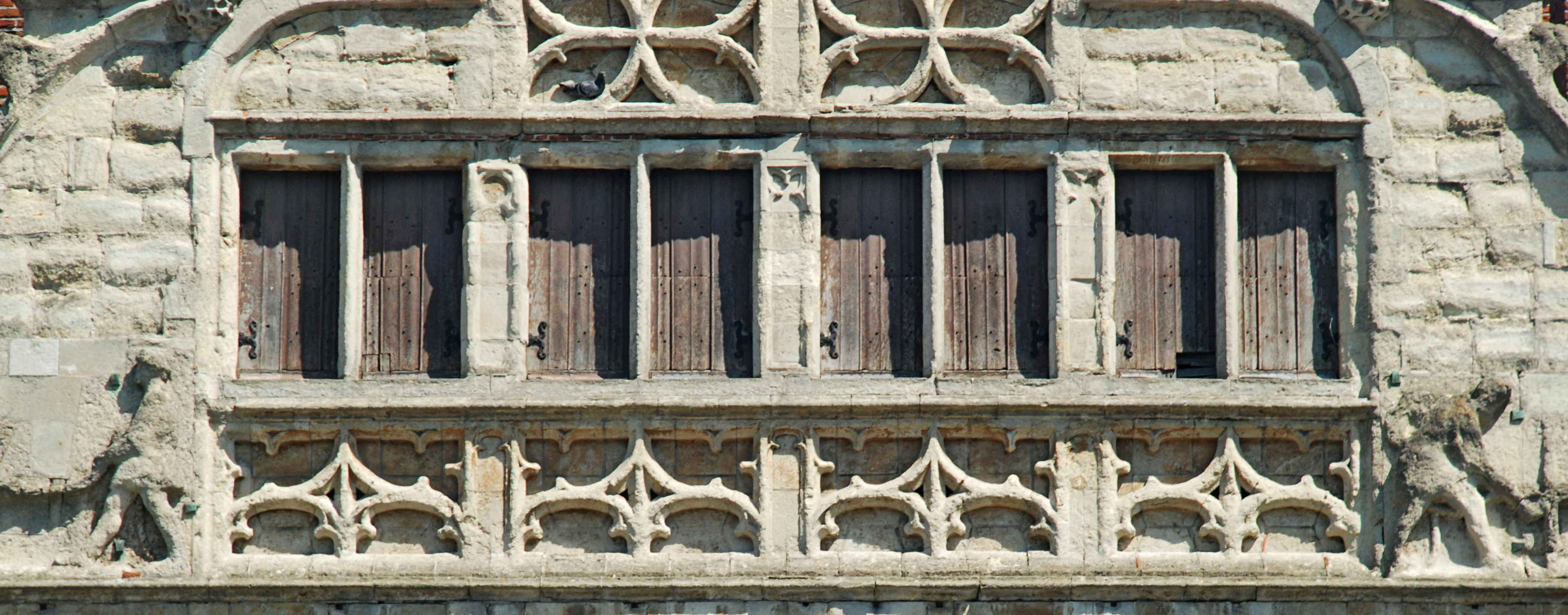 Belgique - Gand - Maison des Francs-Bateliers